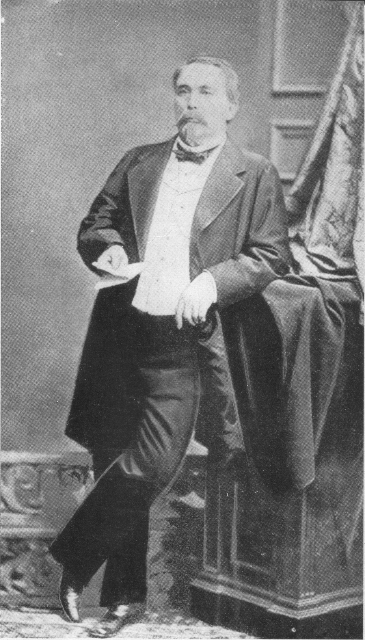 August Zang, né le 2 août 1807 à Vienne où il est mort le 4 mars 1888, est un entrepreneur, inventeur, éditeur et homme politique autrichien.